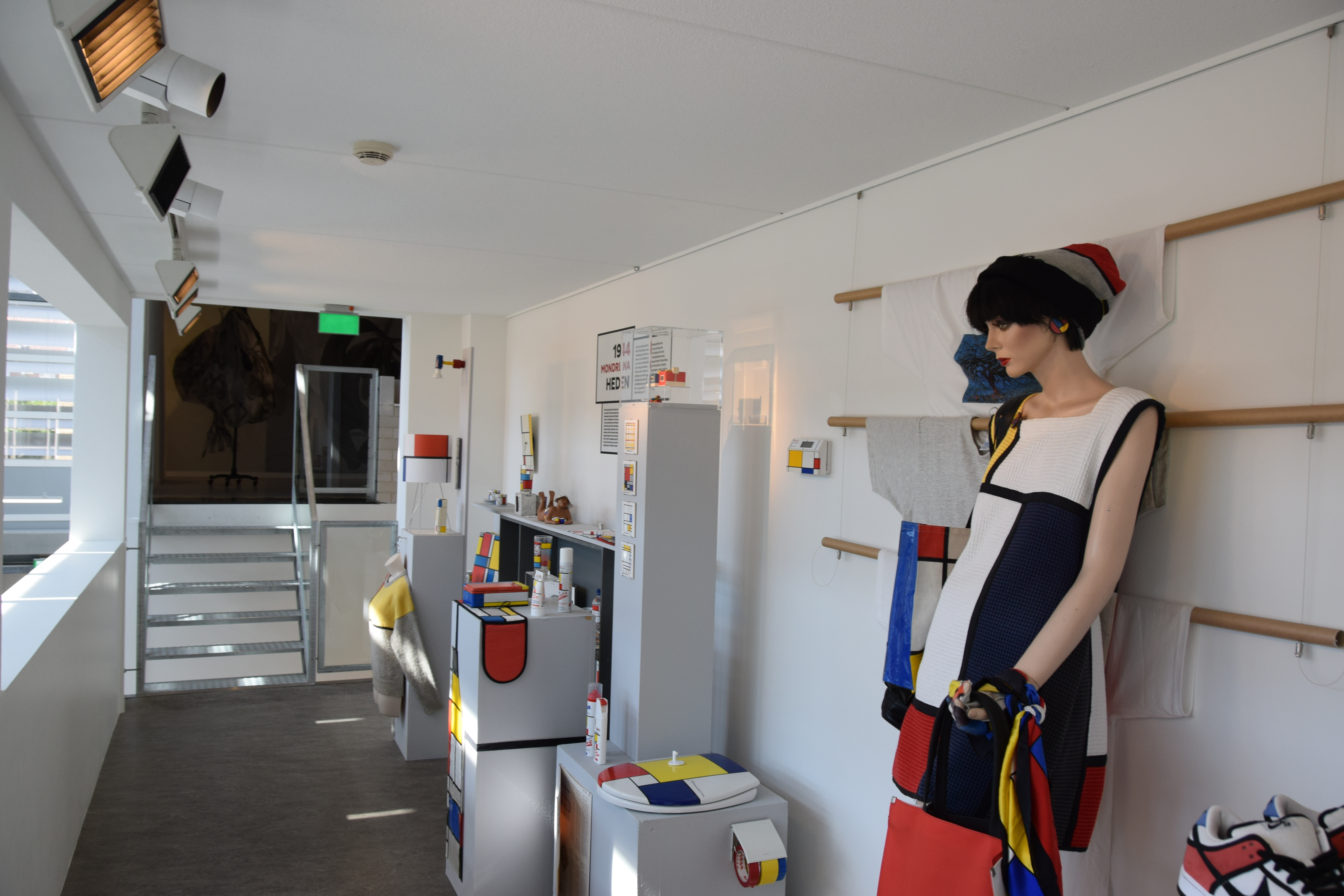 Vue de la maison natale de Piet Mondrian à Amersfoort aux Pays-Bas.